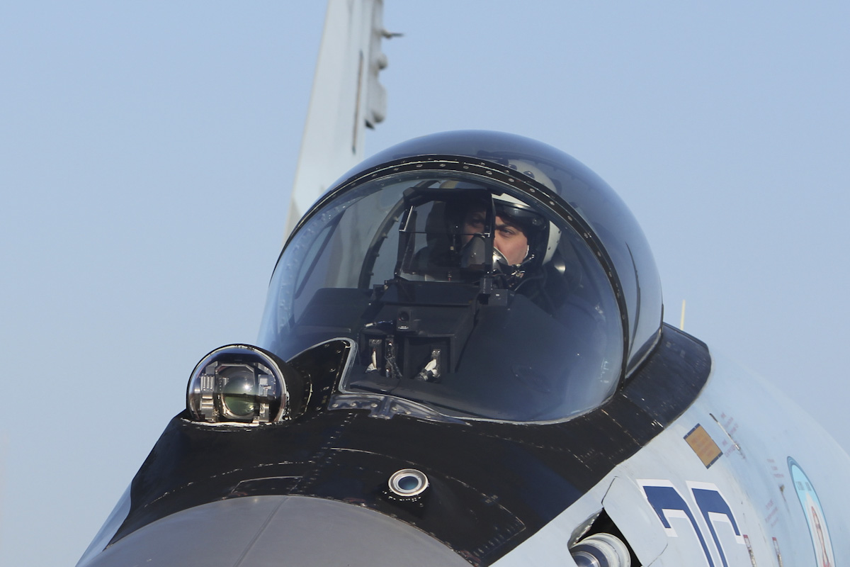 Торжественные мероприятия на аэродроме Центральная Угловая приуроченные к столетию со дня образования 22-го истребительного авиационного Халхингольского Краснознамённого полка 303-й смешанной авиадивизии Восточного военного округа.